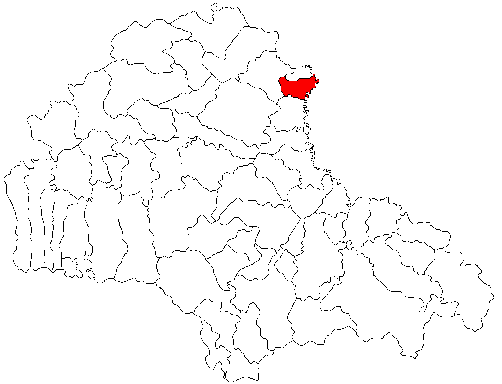 Categorie:Hărţi ale judeţului Braşov